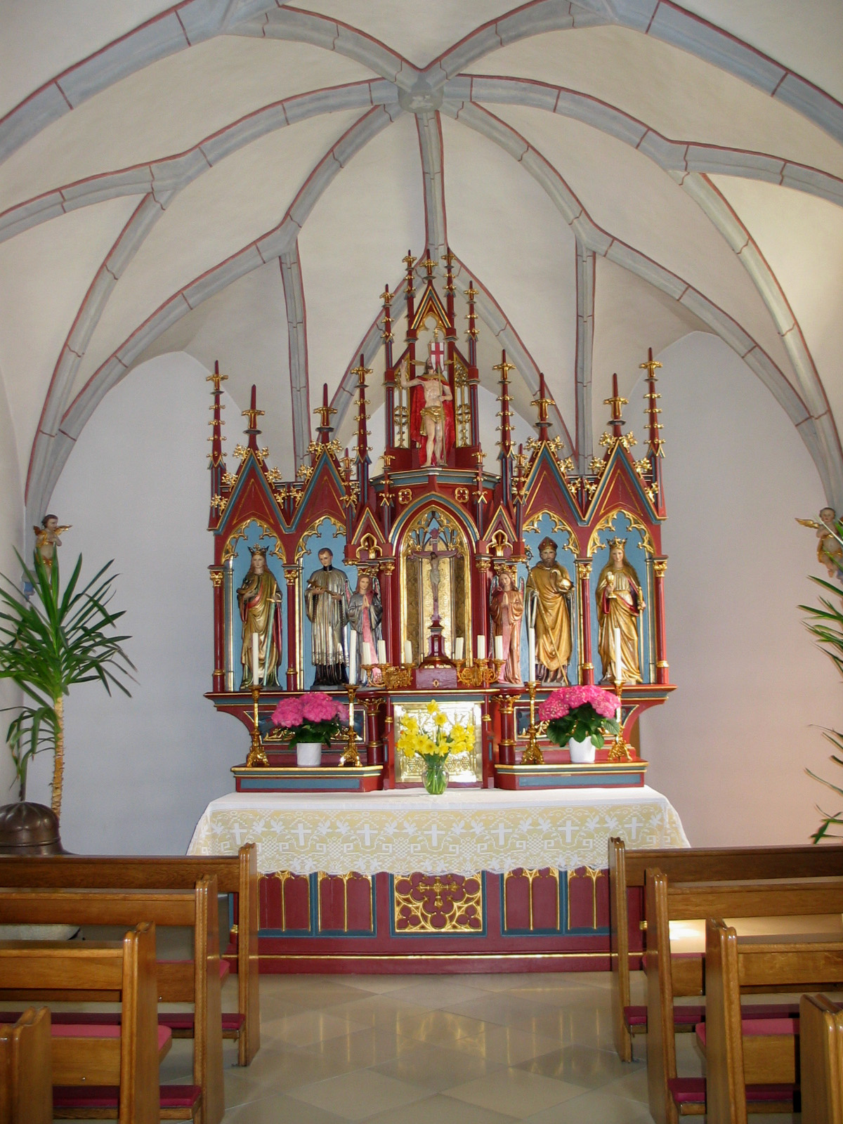 Niederhöcking, Kath. Pfarrkirche St. Martin. Alter Chorraum gegen Osten.